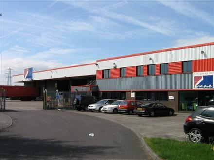 garonor